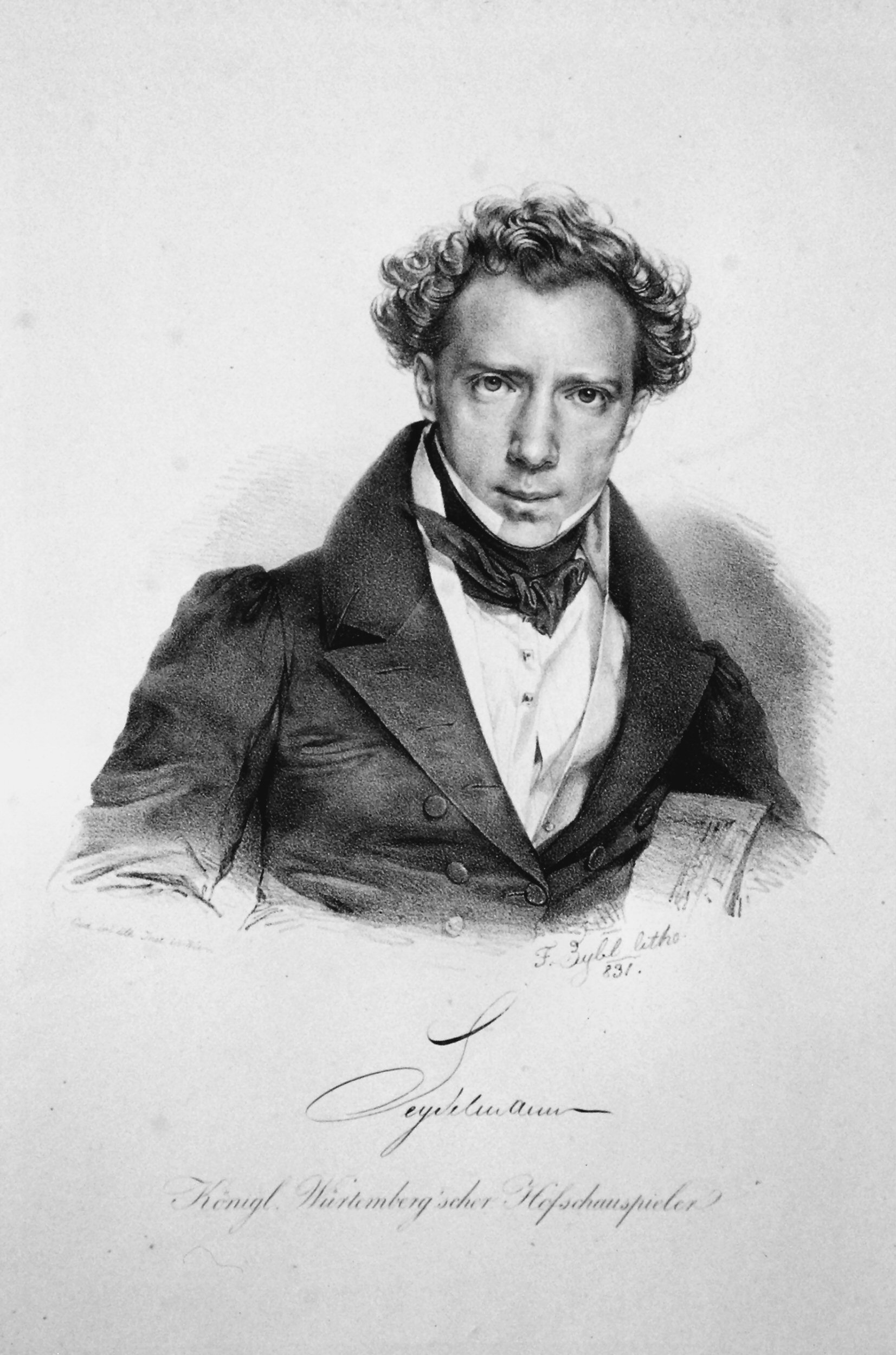 Karl Seydelmann (1793-1843), deutscher Schauspieler. Lithographie von Franz Eybl, 1831